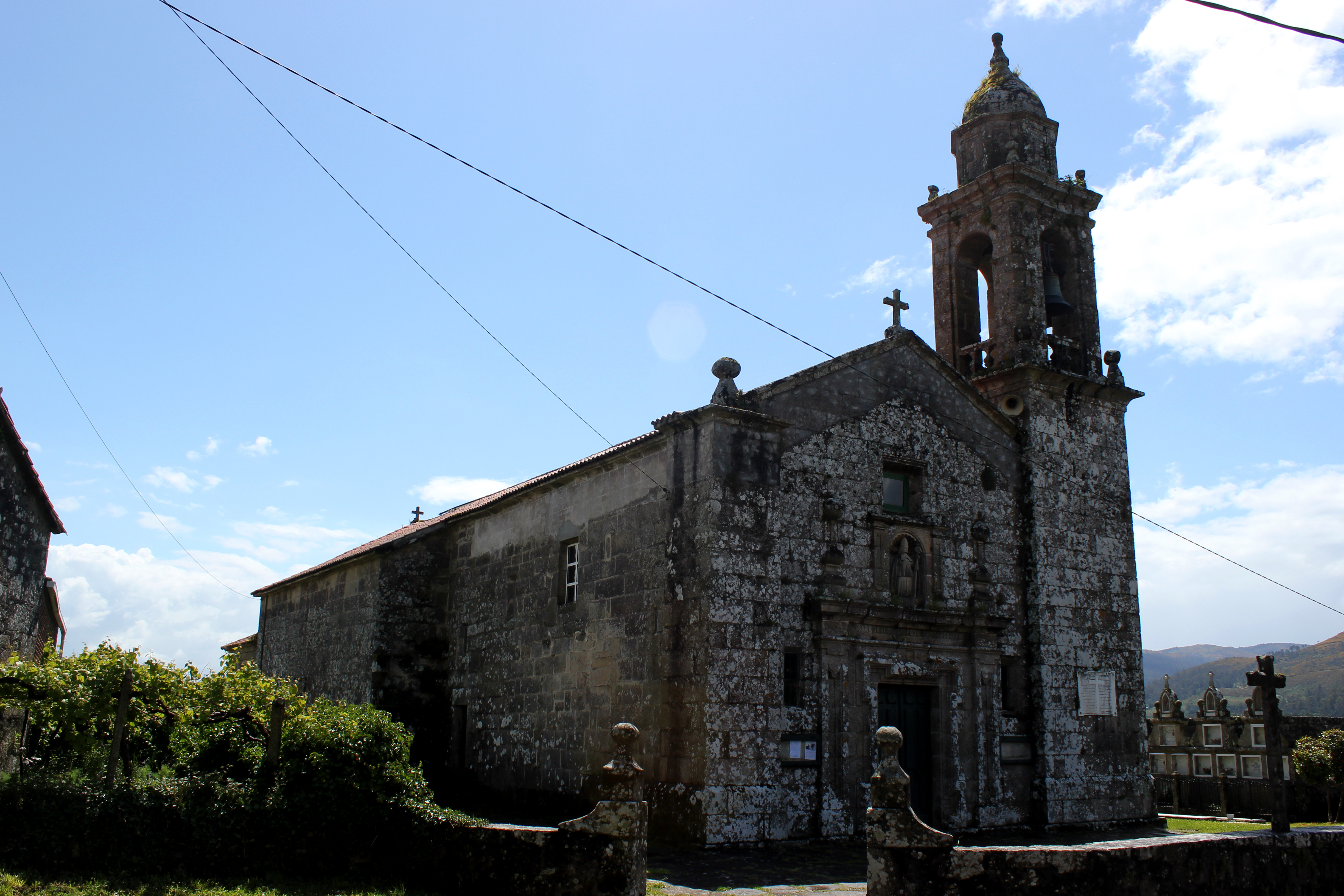 Igrexa de Carcacía, Padrón.